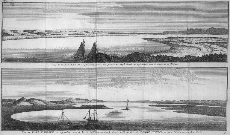 [Illustrations de Voyage autour du monde] Auteur : George Anson Éditeur : Henri-Albert Gosse et Compagnie (Genève) 1750